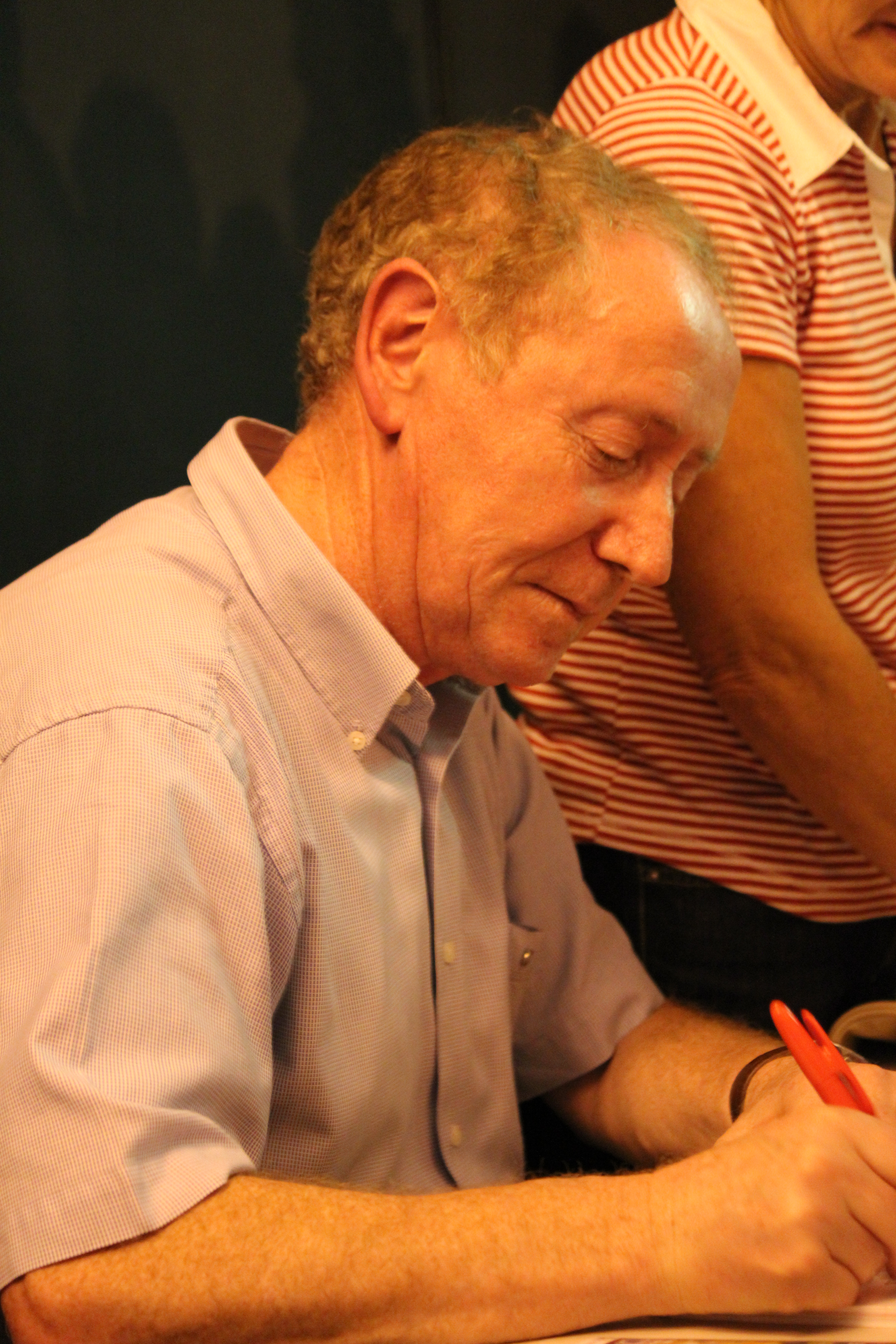 Hervé Lossec au festival interceltique de Lorient 2011